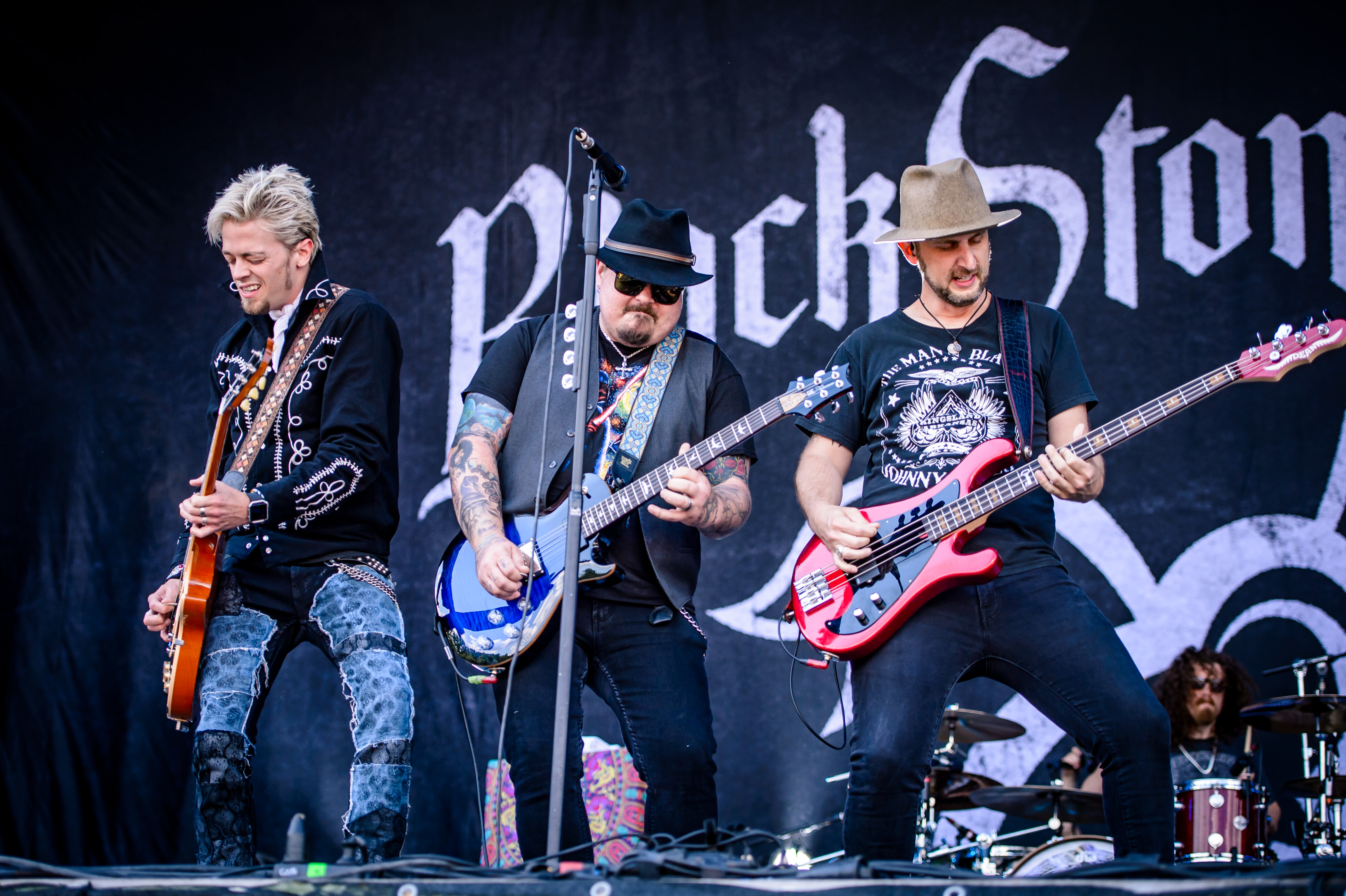 'Rock im Park 2018; Zeppelinfeld Nürnberg': 'Black Stone Cherry'